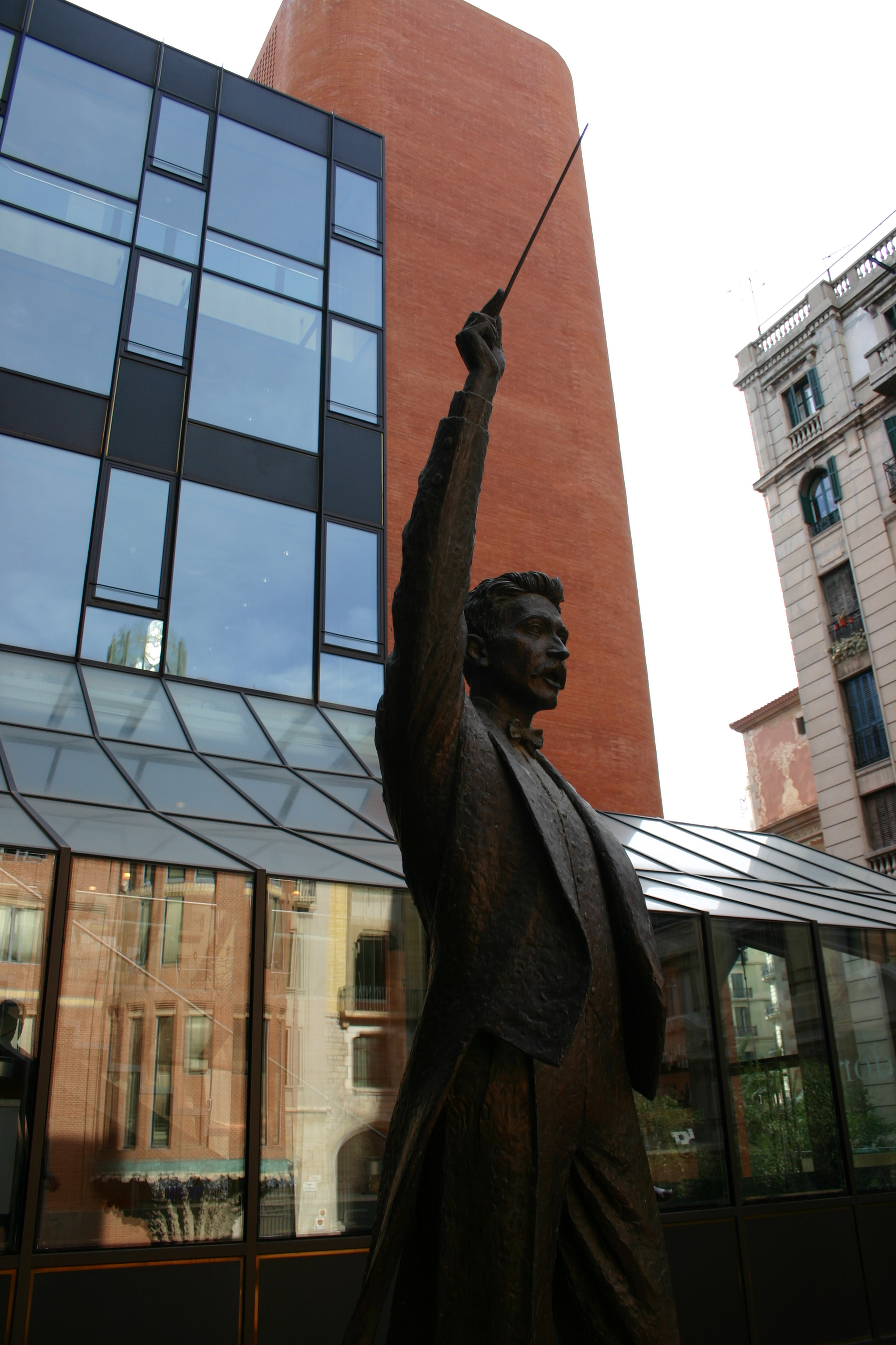 Palau de la Música Catalana. Arquitecte:Lluís Domènech i Montaner